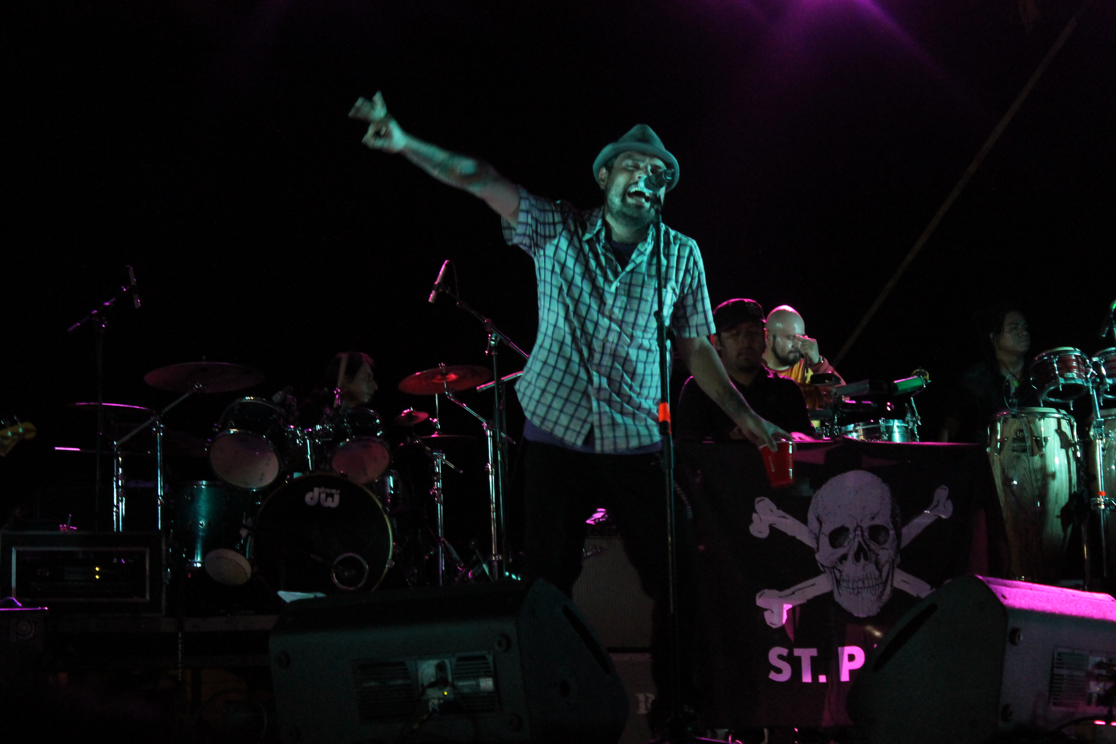 Panteon rococo en el festival " antes de que se acabe" que se llevo acabo el 2 de noviembre en cancun